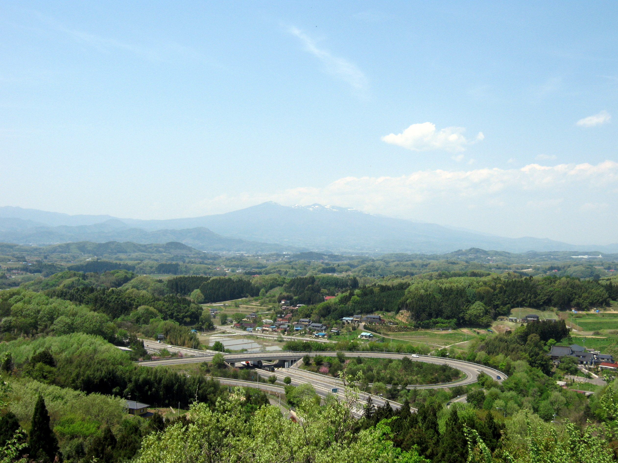 磐越道 郡山東インターチェンジ